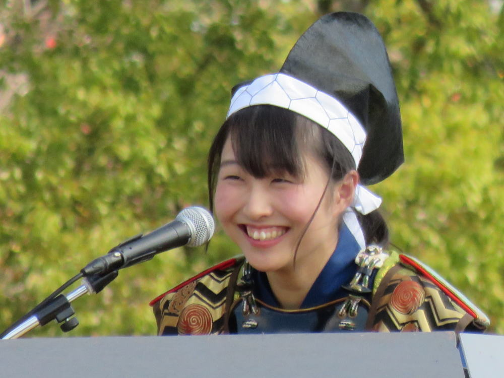 将棋棋士の武富礼衣（平成３０年１１月、姫路市で行われた人間将棋にて）